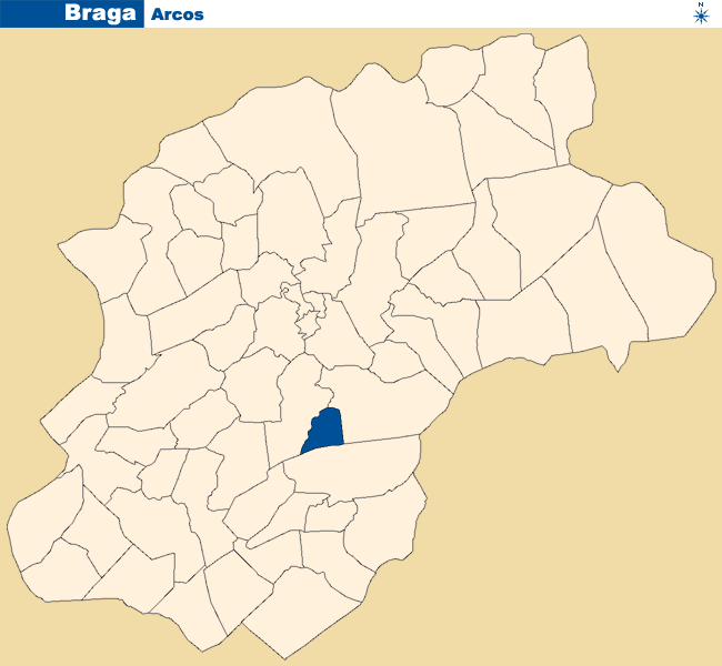 Localização de Arcos no concelho de Braga.